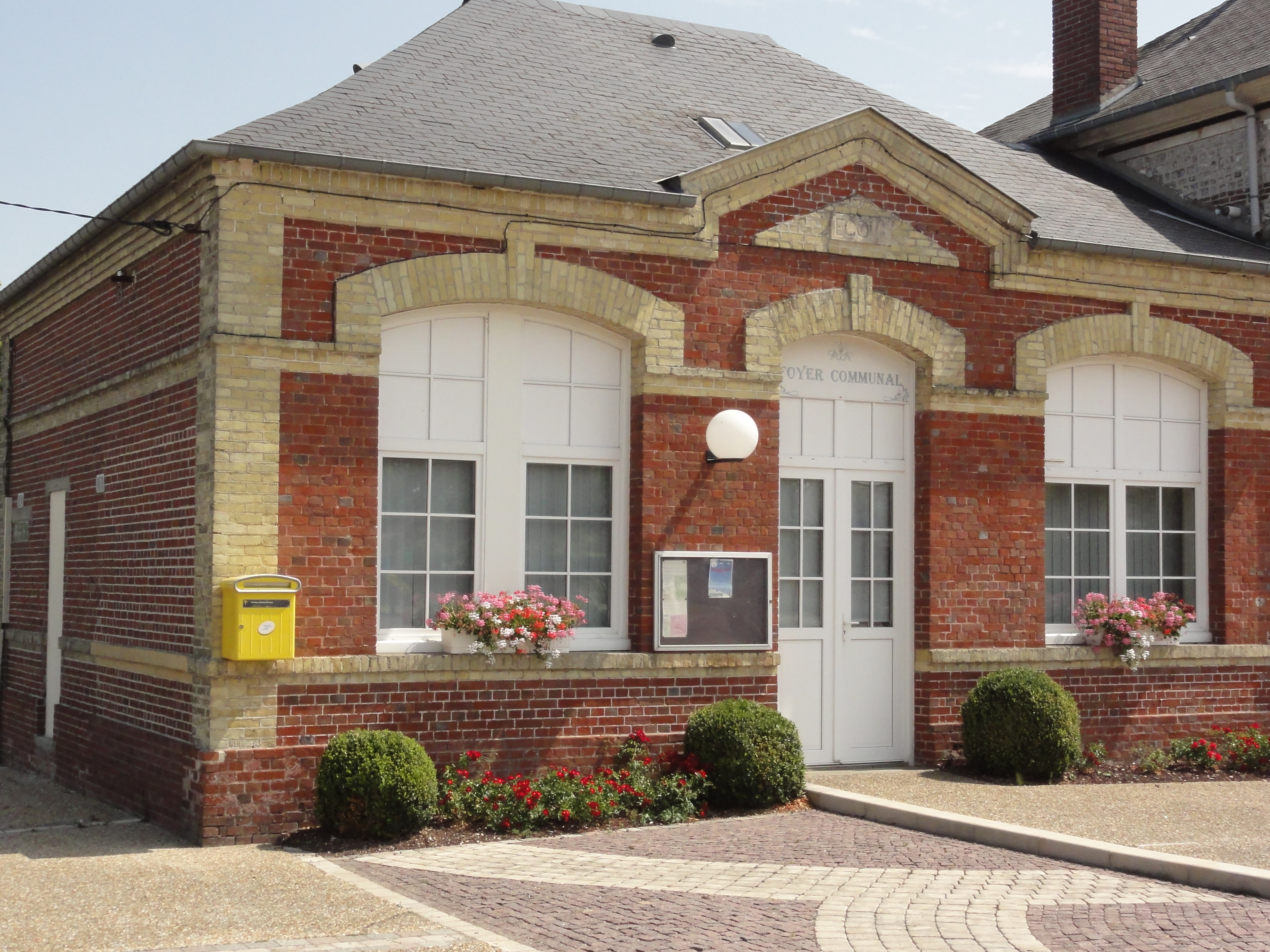 Petiville (Seine-Mar.) foyer rural